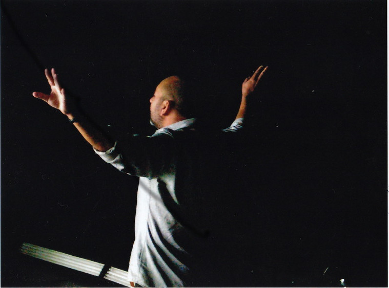 Komponist Biber Gullatz bei der Parzival Probe 2009